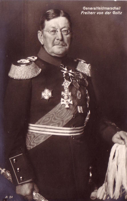 Colmar Freiherr von der Goltz, Prussian Field Marshal